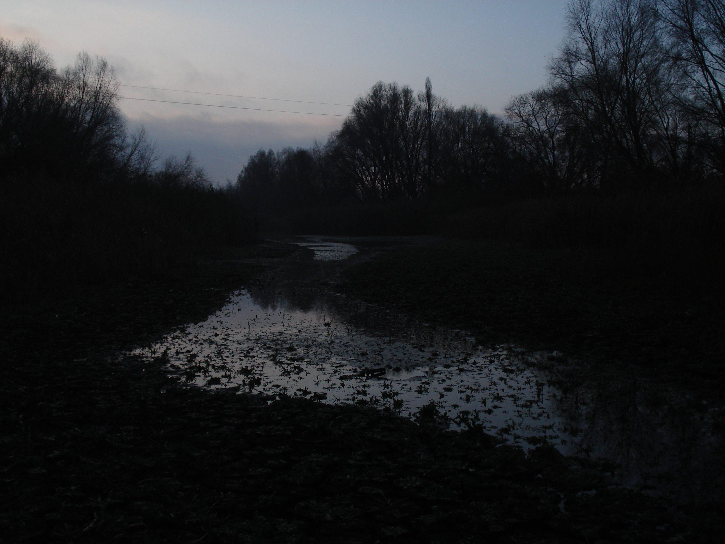 Речка Канава в селе Великий Круполь Киевской области в Украине на рассвете, вид в сторону центра села